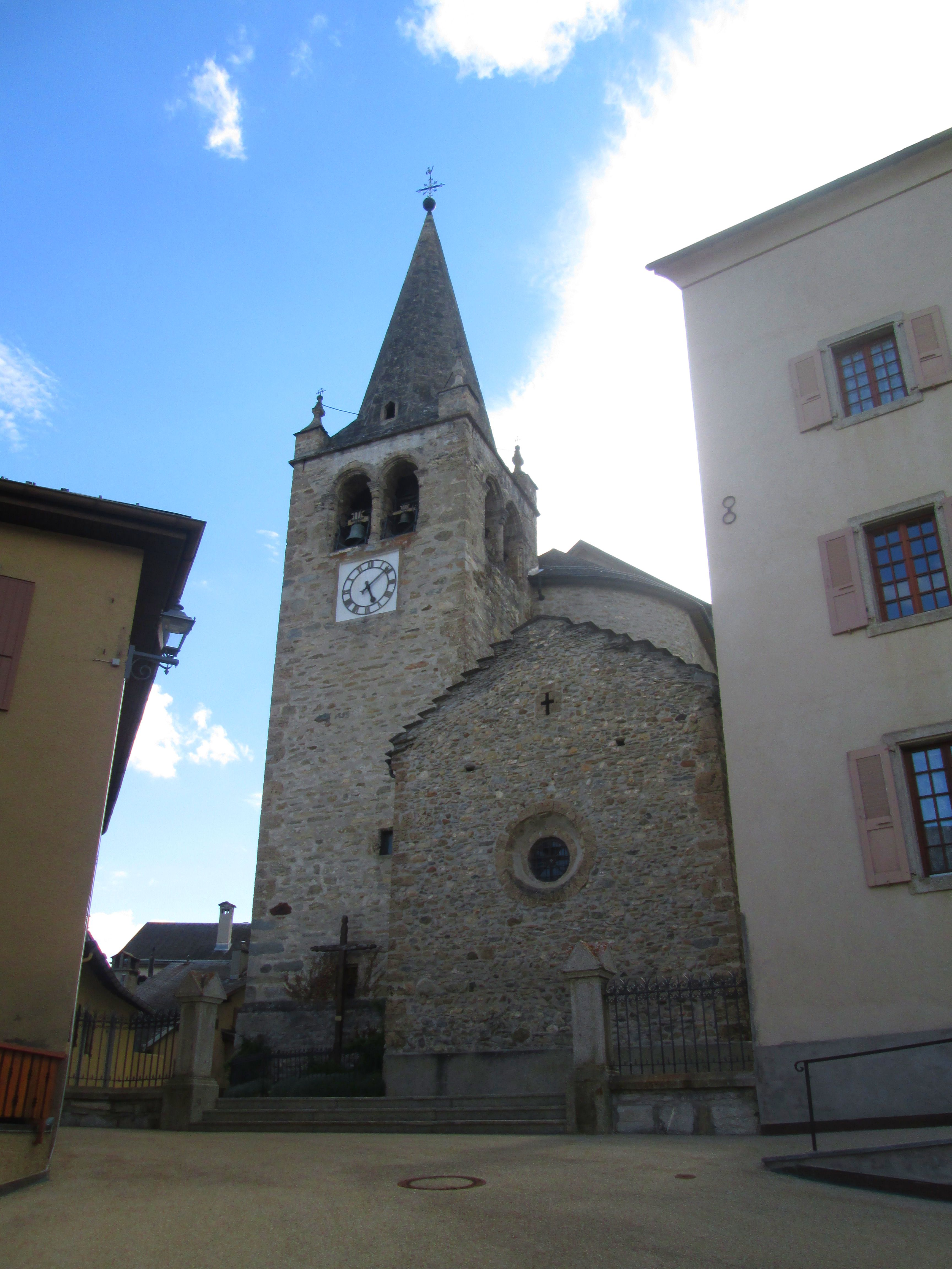 Kirche Saint-Pierre (Turm erbaut 1535–1575 durch Ulrich Ruffiner